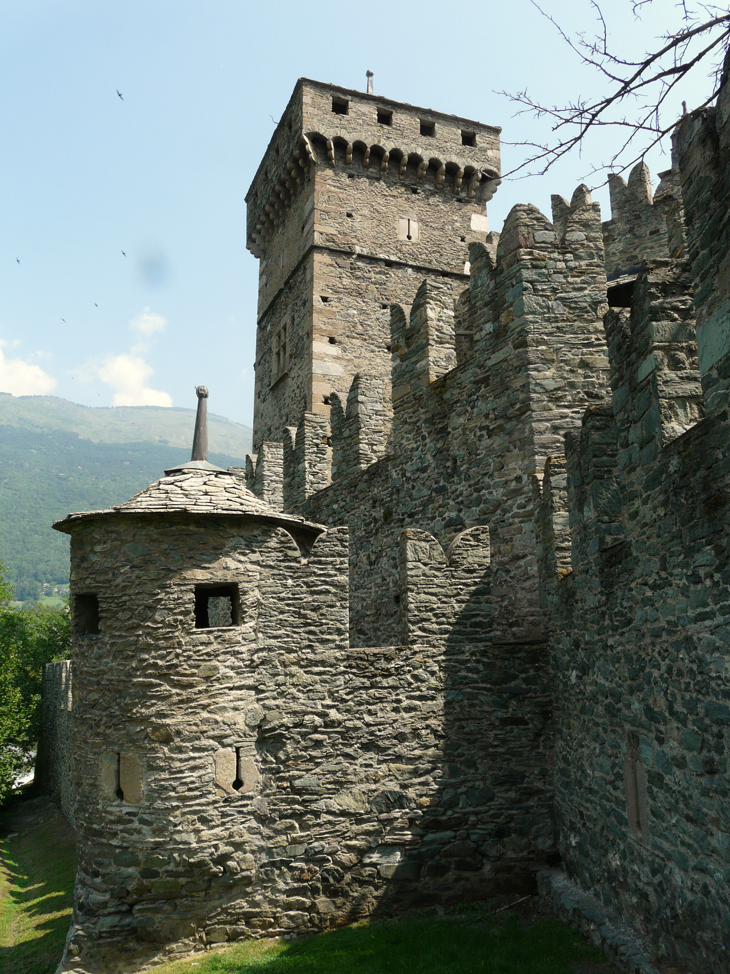 Serie di immagini del Castello di Fénis, Valle d'Aosta, Italia